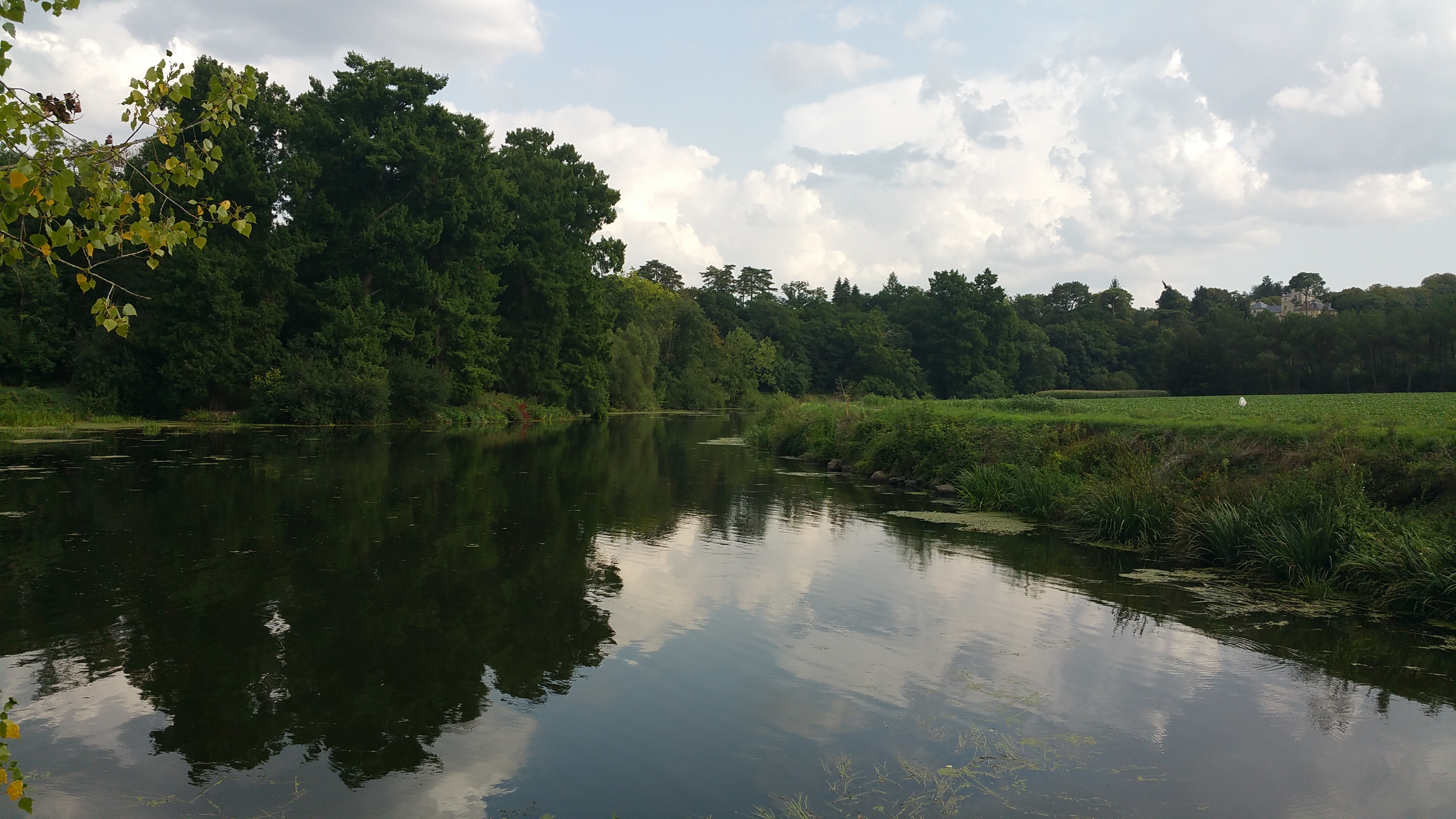 Lieu-dit La Courbe, au pied du fleuve La Vilaine. Sur la gauche, les Cyprès Chauves.